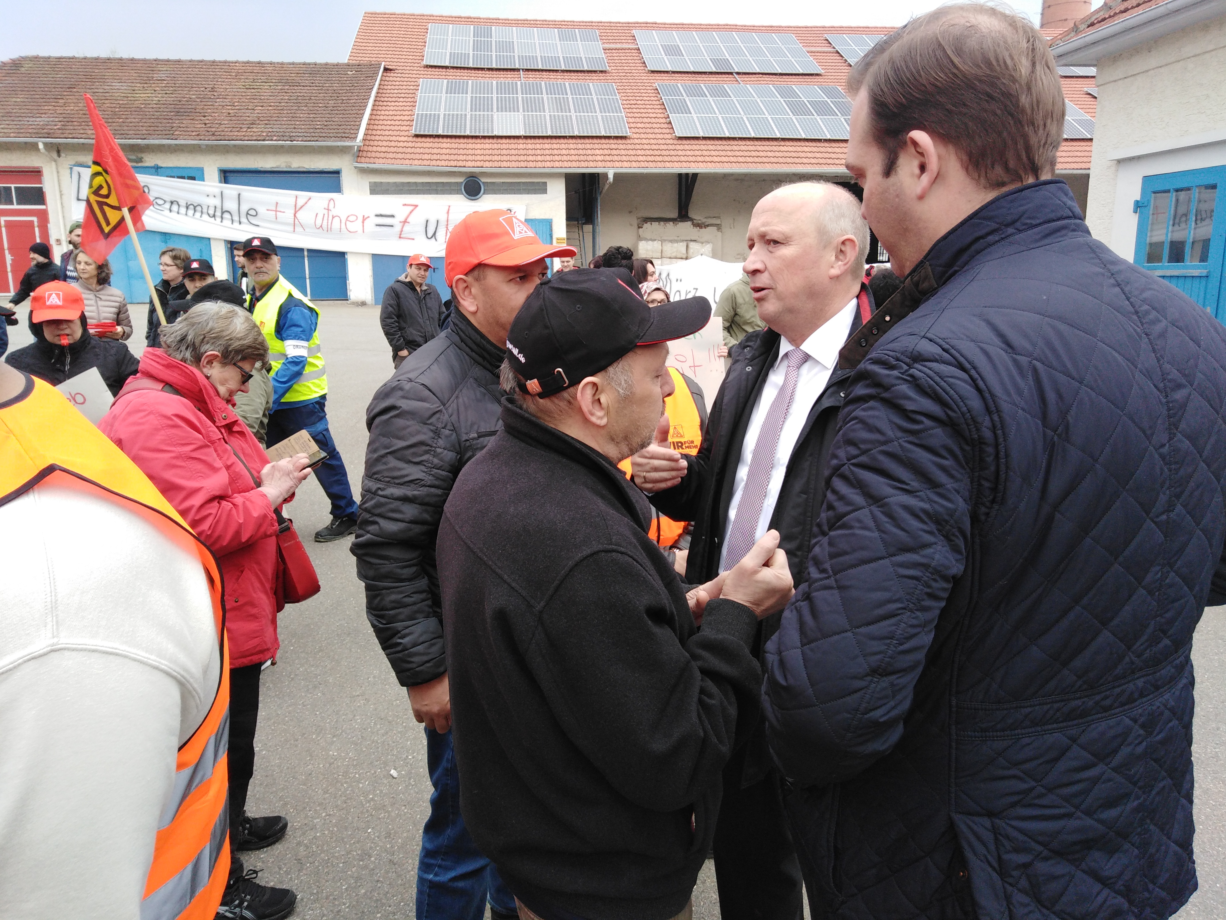 LM Firma Lauffenmühle in Lauchringen. Kundgebung nach angekündigter Betriebsschließung am 13. April 2019. Bürgermeister Thomas Schäuble im Gespräch mit Arbeitern.